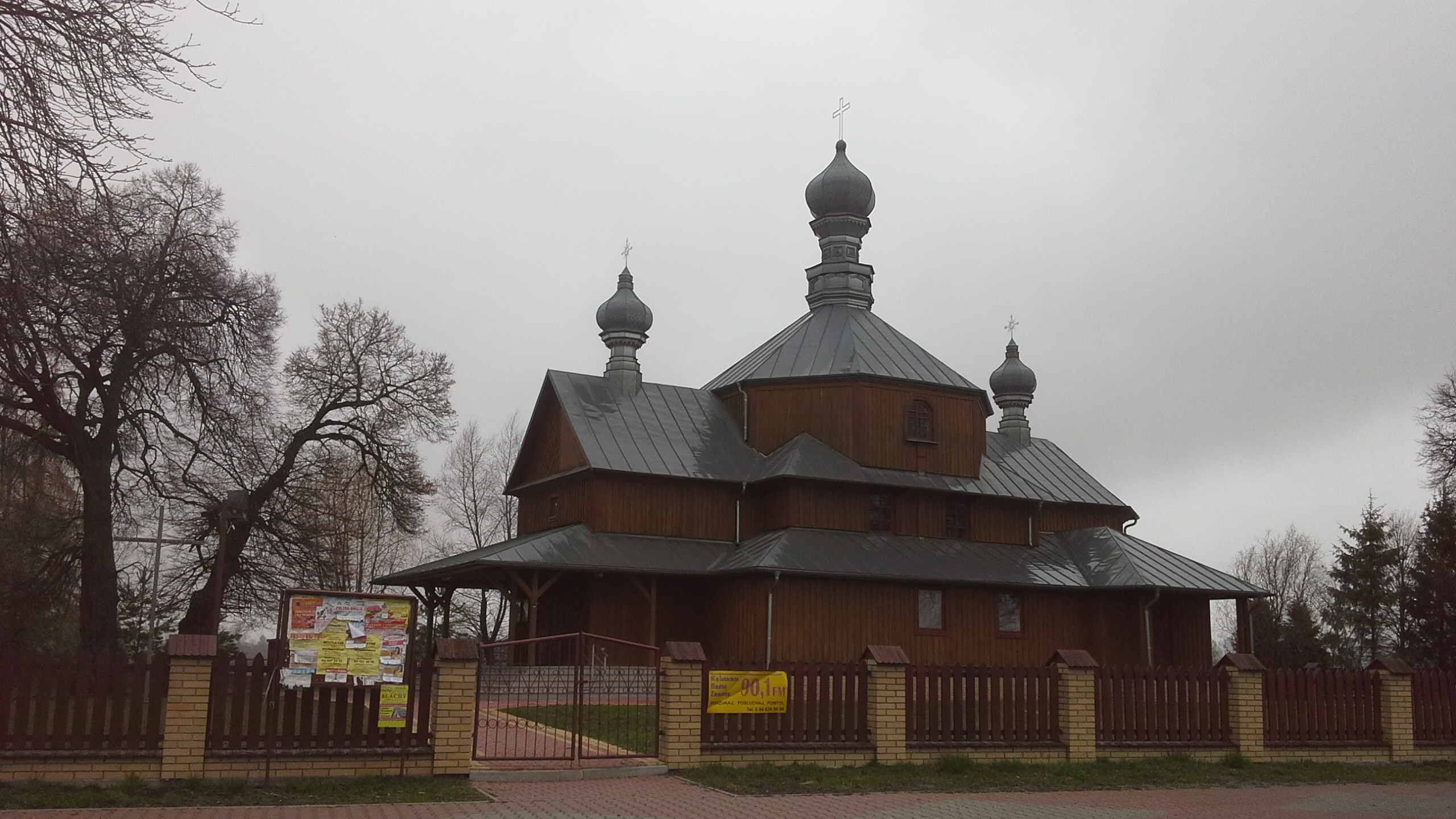 Dawna cerkiew, ob. kościół, w Terebiniu